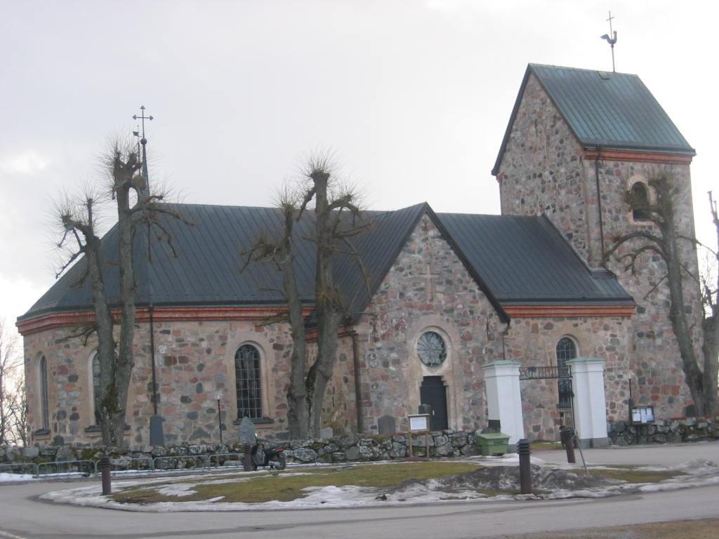 Vallentuna kyrka, april sv:2006.